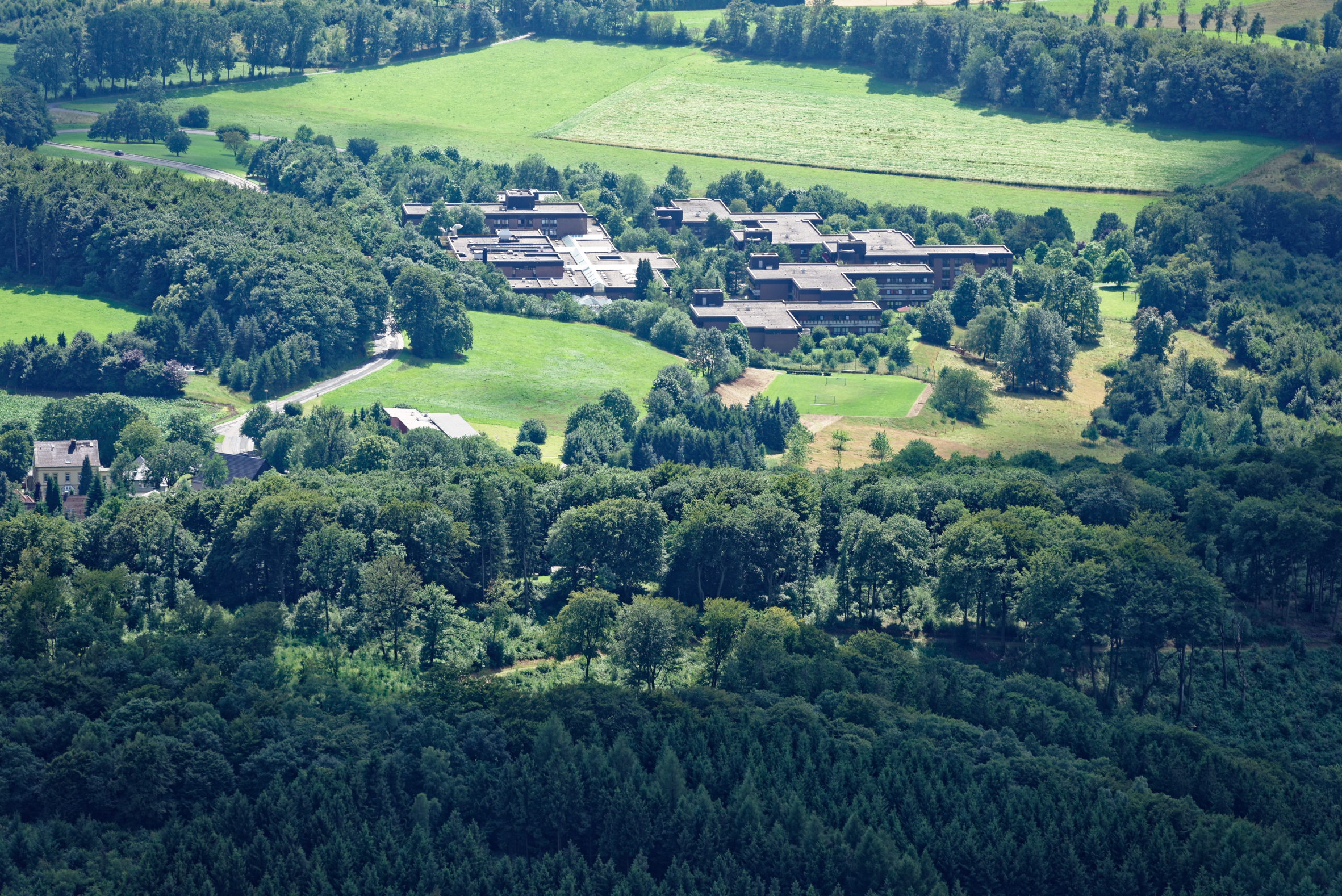 Luftaufnahme: LWL-Klinik Hemer, Nordrhein-Westfalen